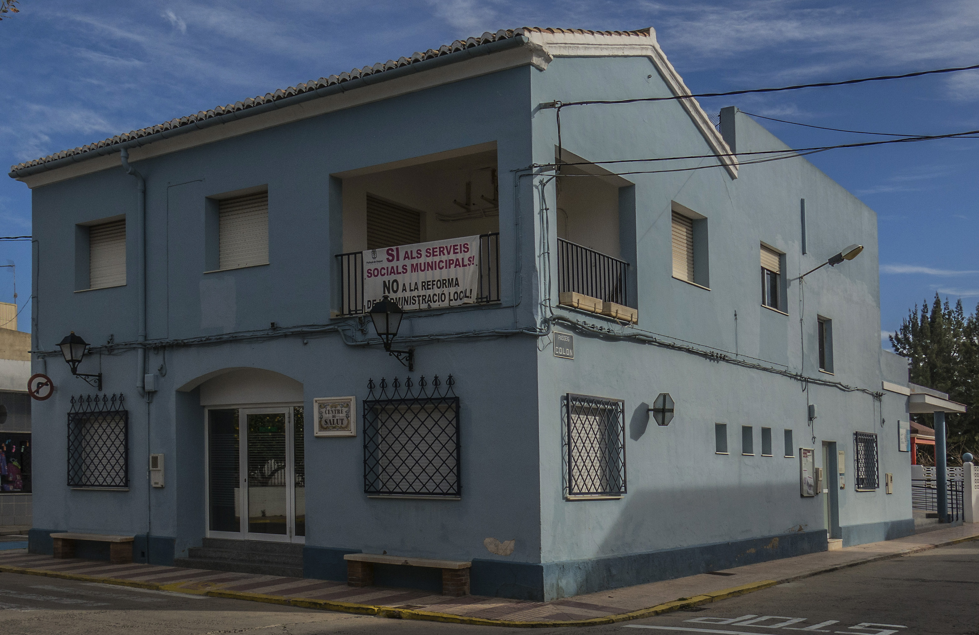 Polinyà de Xúquer és un municipi del País Valencià situat a la comarca de la Ribera Baixa.